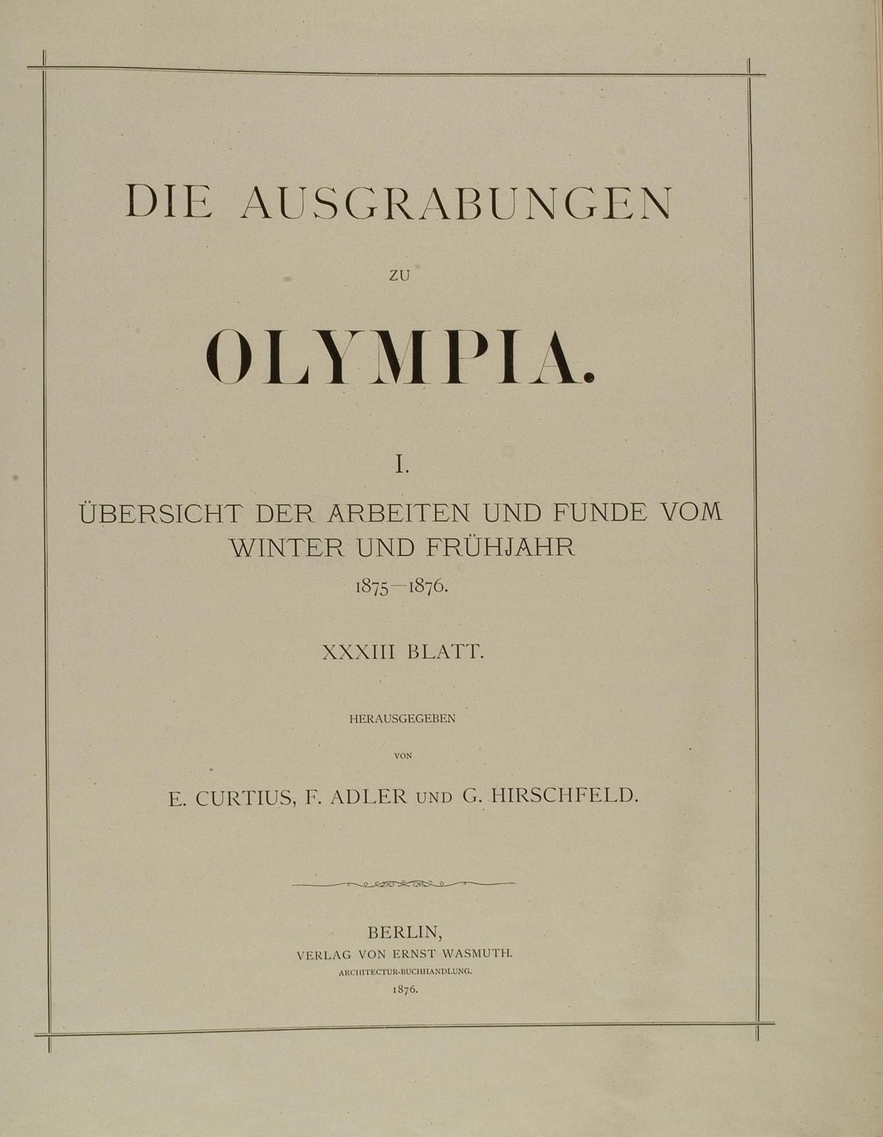 Titelblatt des ersten Bandes der Grabungsbericht von Olympia, 1875/1876.